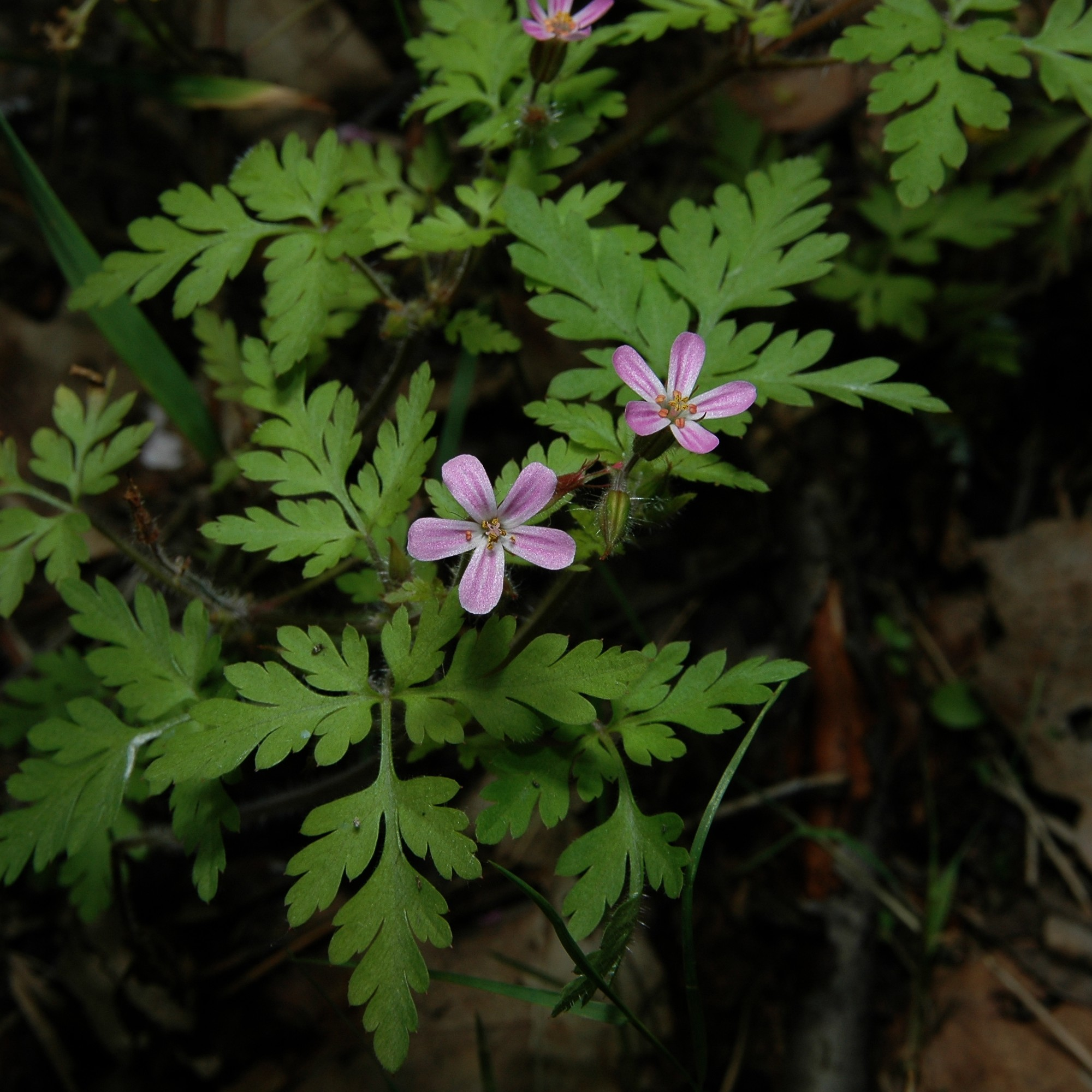 Geranium robertianum in Västerås